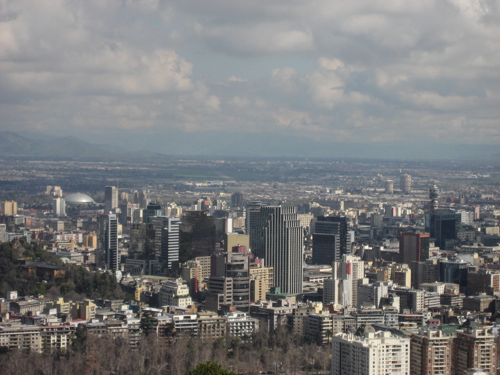 Santiago, Chile